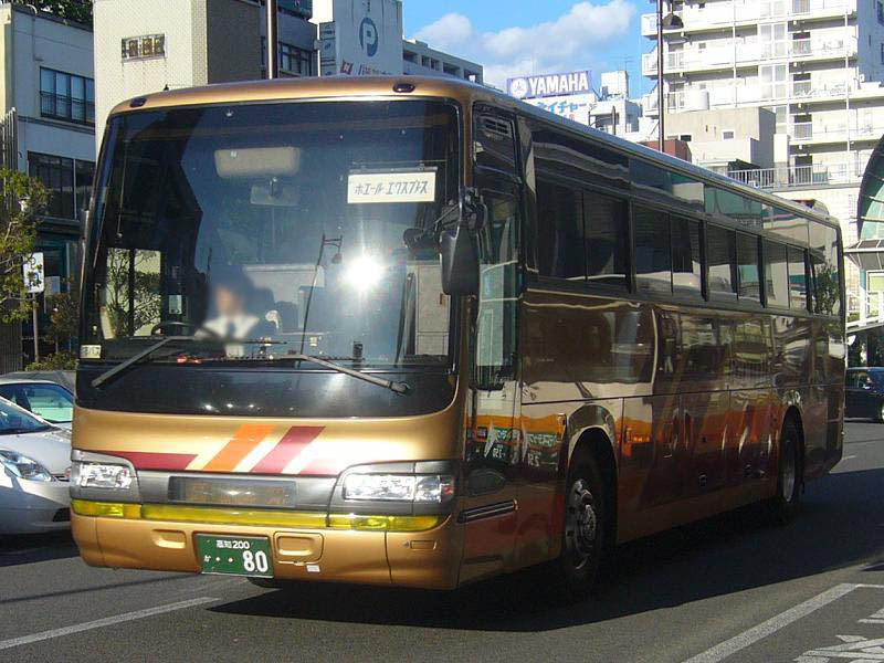 登録番号 高知200か80 高知県交通所属 ホエールエクスプレス号用 2007年5月20日 松山市駅前にて撮影 撮影者 Tokatsu kokubu